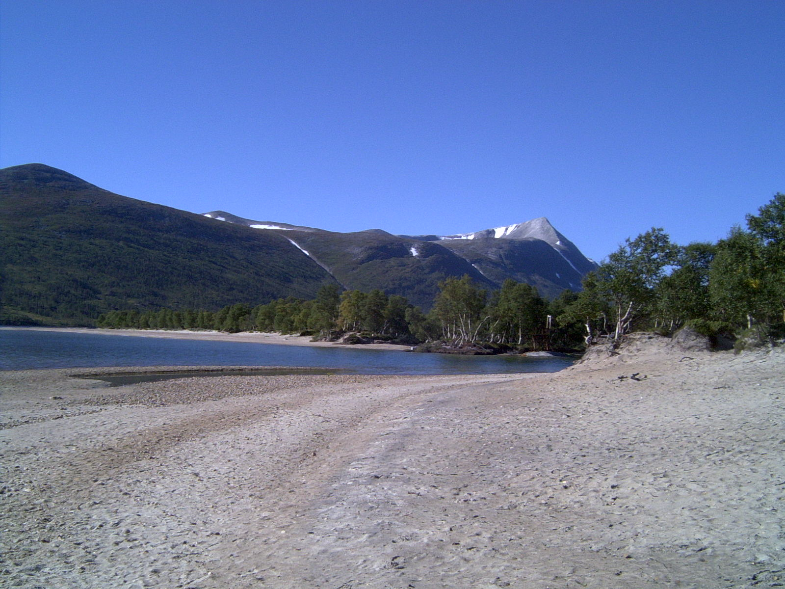 Raudøra, Gjevillvatnet, Oppdal, Norway.